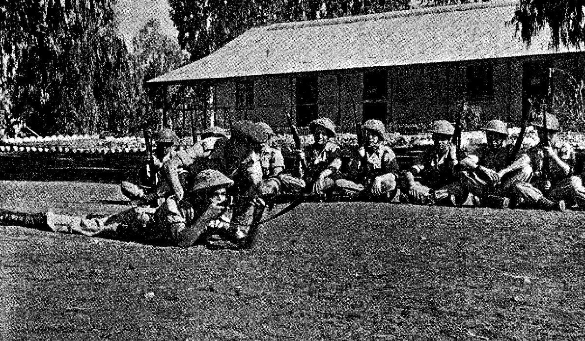 אימון נשק בבה"ד 4